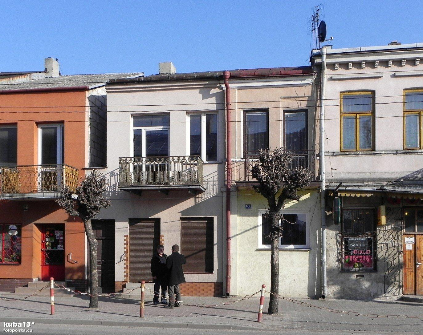 Ulica Lubelska 91.